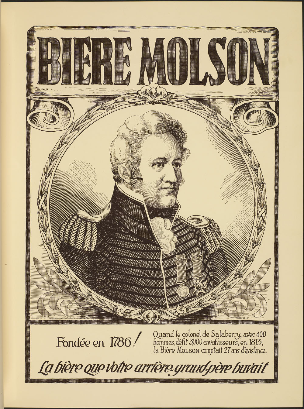 Title / Titre : Biere Molson, Colonel de Salaberry Creator(s) / Créateur(s) : Unknown / Inconnu Date(s) : circa / vers 1924 Reference No. / Numéro de référence : MIKAN 3000365, 4328111 Location / Lieu : Unknown / Inconnu Credit / Mention de source : Library and Archives Canada, e010952201 / Bibliothèque et Archives Canada, e010952201